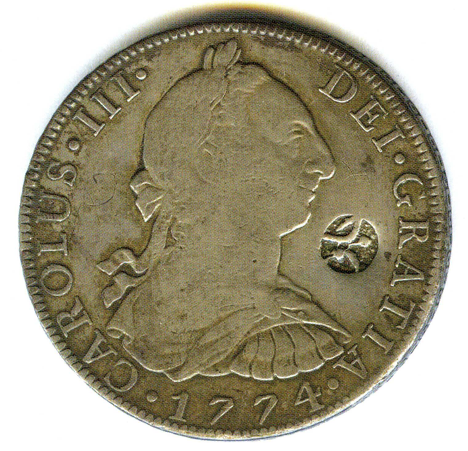 Moneda de Carlos III con leyenda en árabe dentro de círculo.